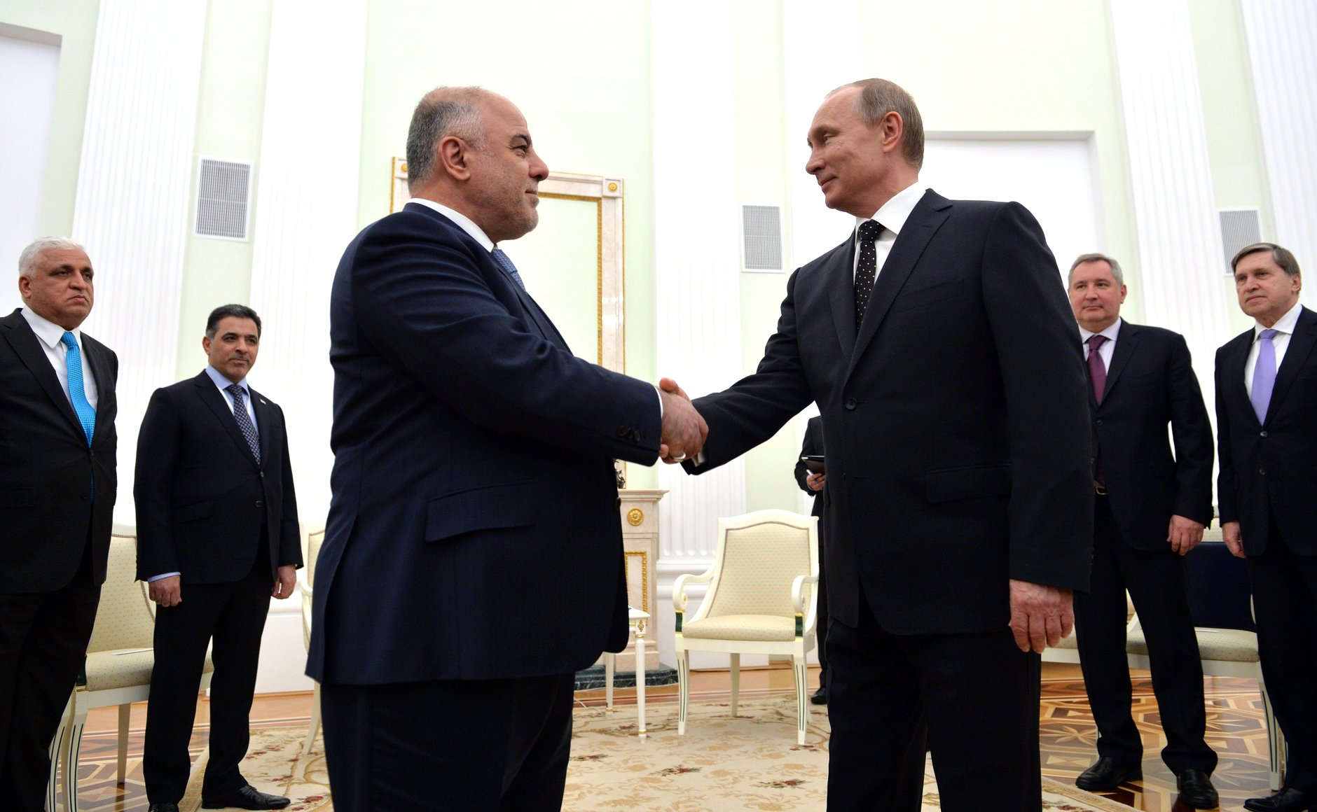 Встреча Президента России Владимира Путина с премьер-министром Ирака Хайдаром Абади